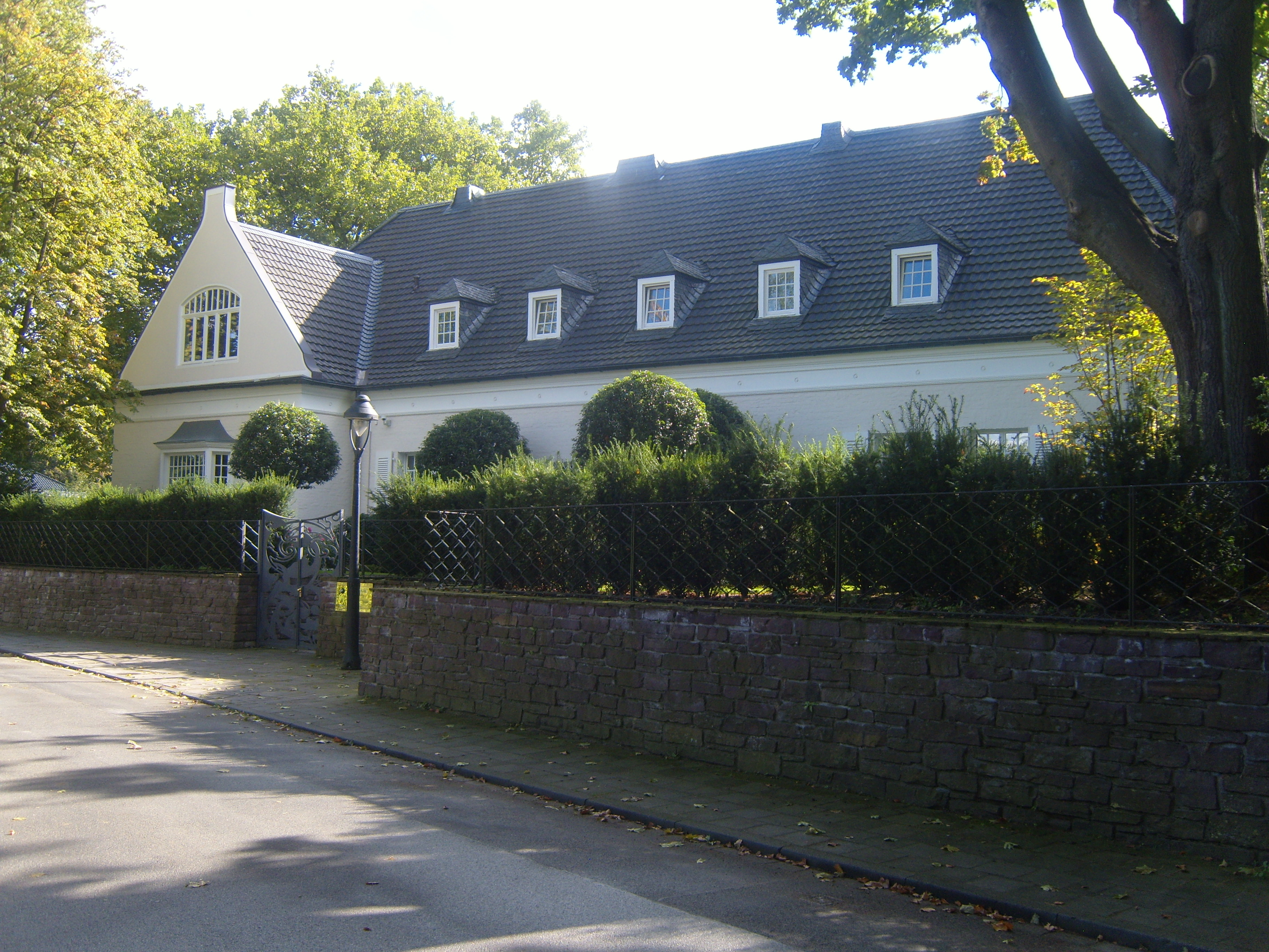 Villa Marein in Meerbusch-Büderich, Vorderseite